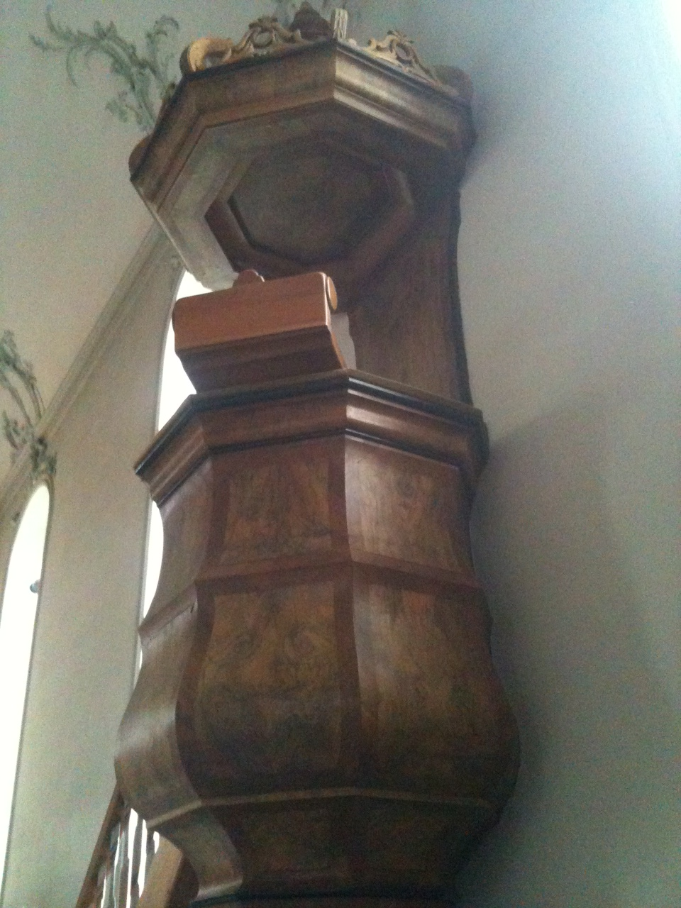 Kanzel in der reformierten Kirche Gais AR